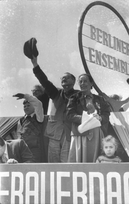 ADN-ZB/Sturm/01.05.1954/Berlin/1. Mai 1954, Marx-Engels-Platz. Der Wagen des Berliner Ensembles mit Bertolt Brecht und Helene Weigel.